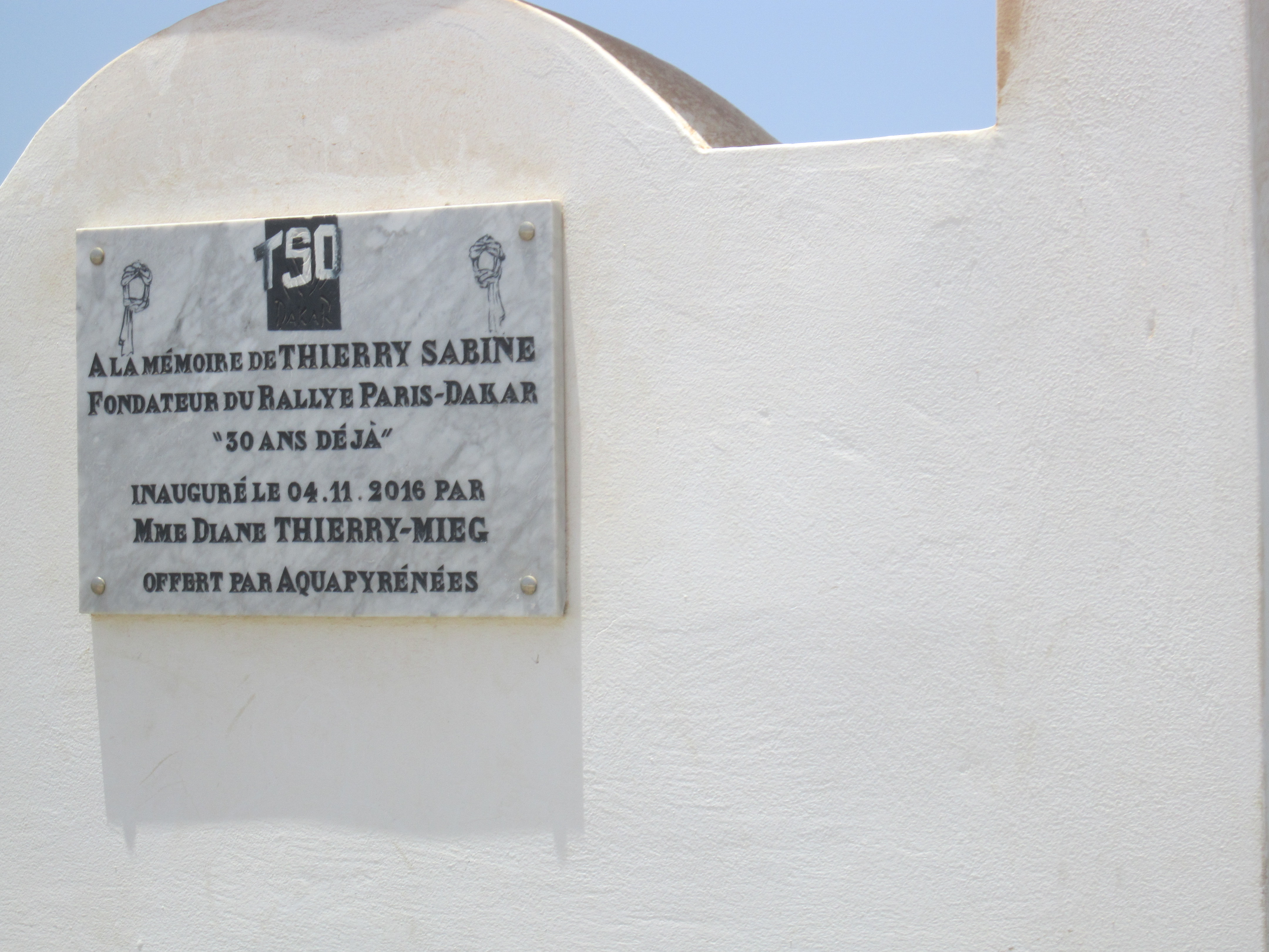 Stèle à la mémoire de Thierry Sabine, fondateur du rallye Paris-Dakar, Lac rose, Sénégal This is an image with the theme "Africa on the Move or Transport" from: Senegal